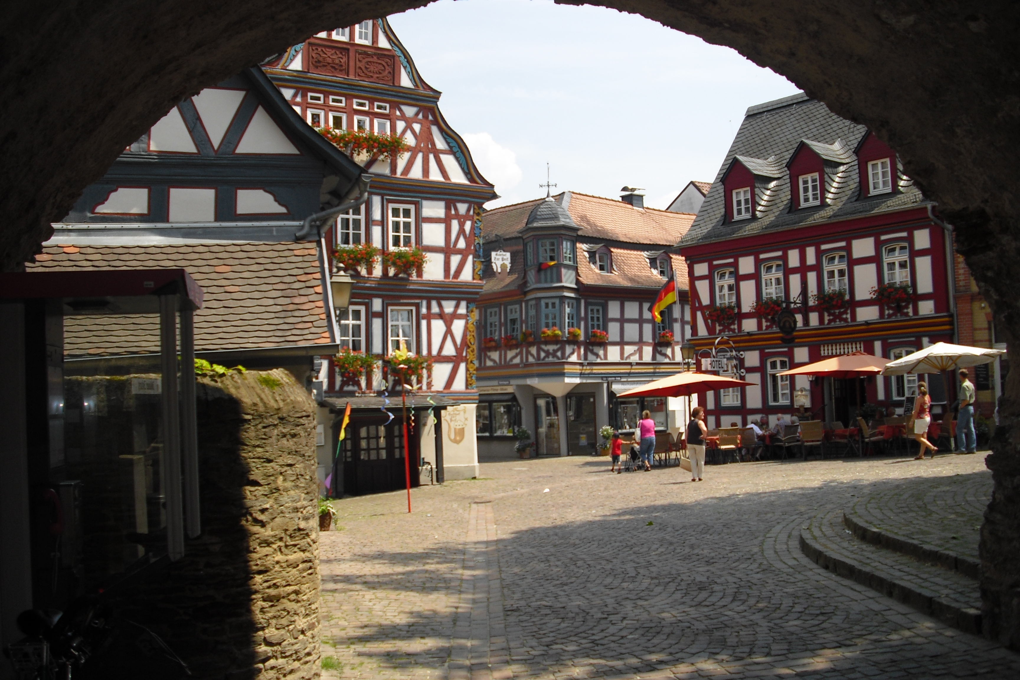 Idsteins Innenstadt 2010